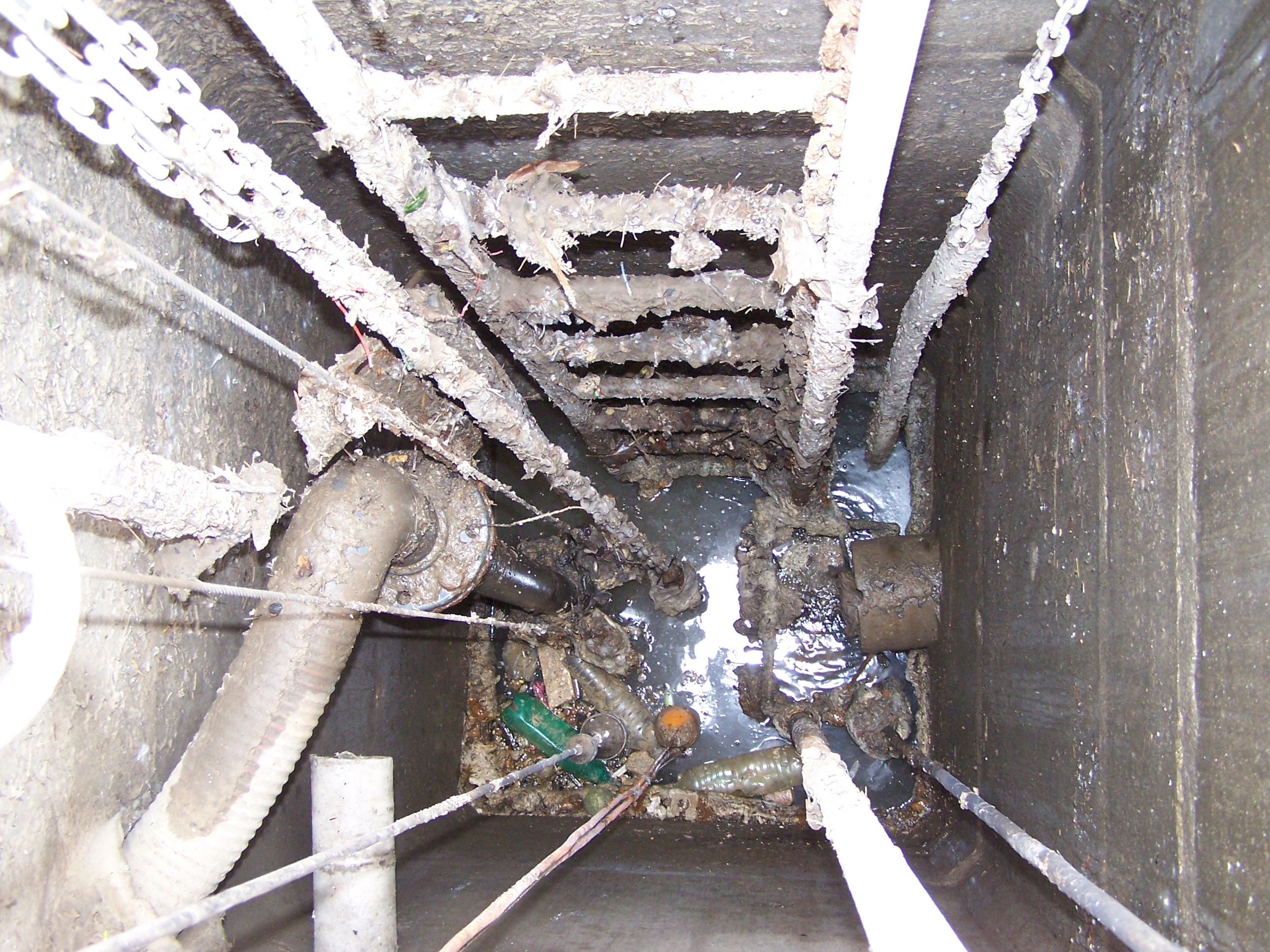 Pompes de relevage submersibles classiques